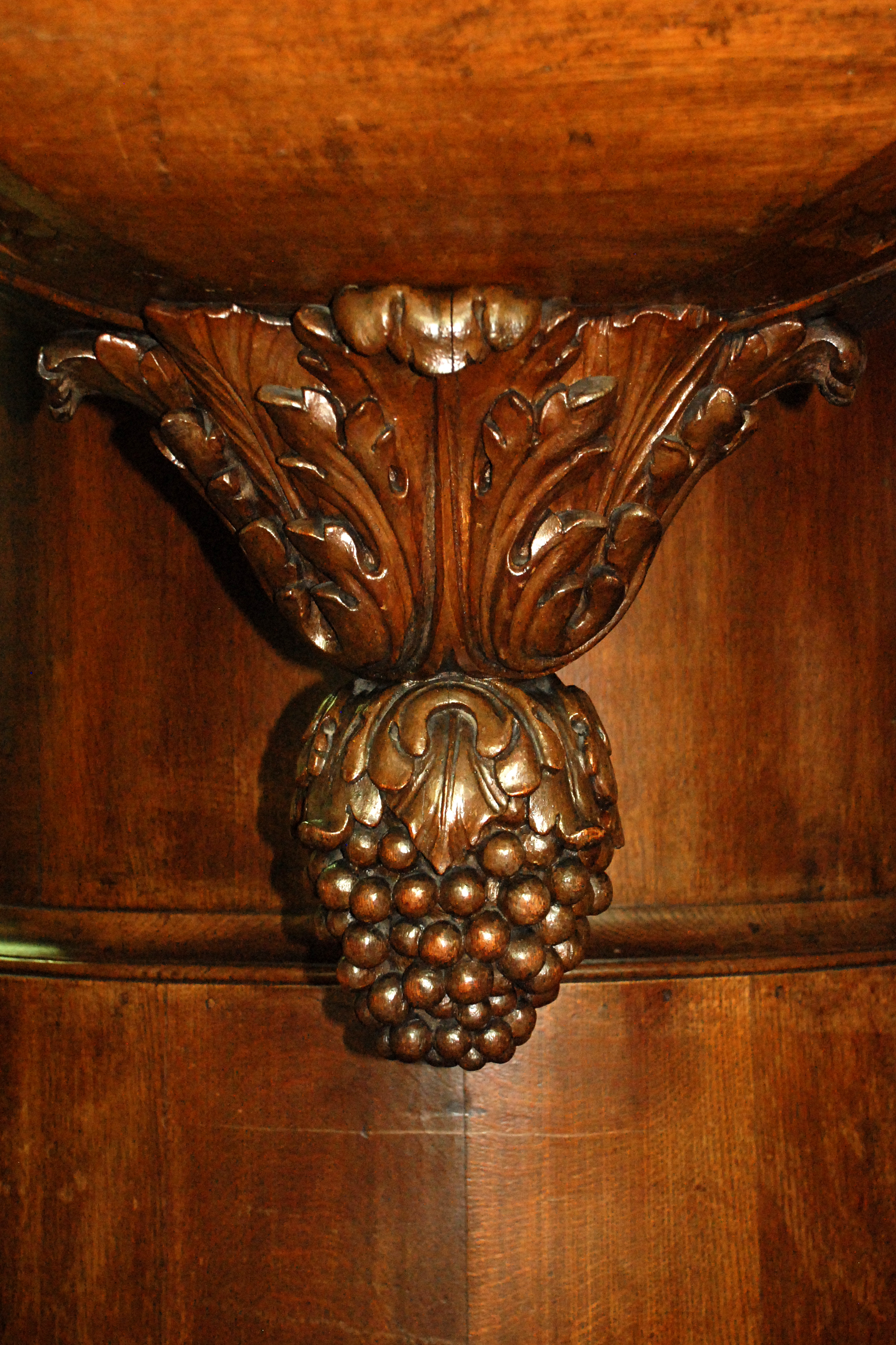 Belgique - Brabant wallon - Église de Court-Saint-Étienne